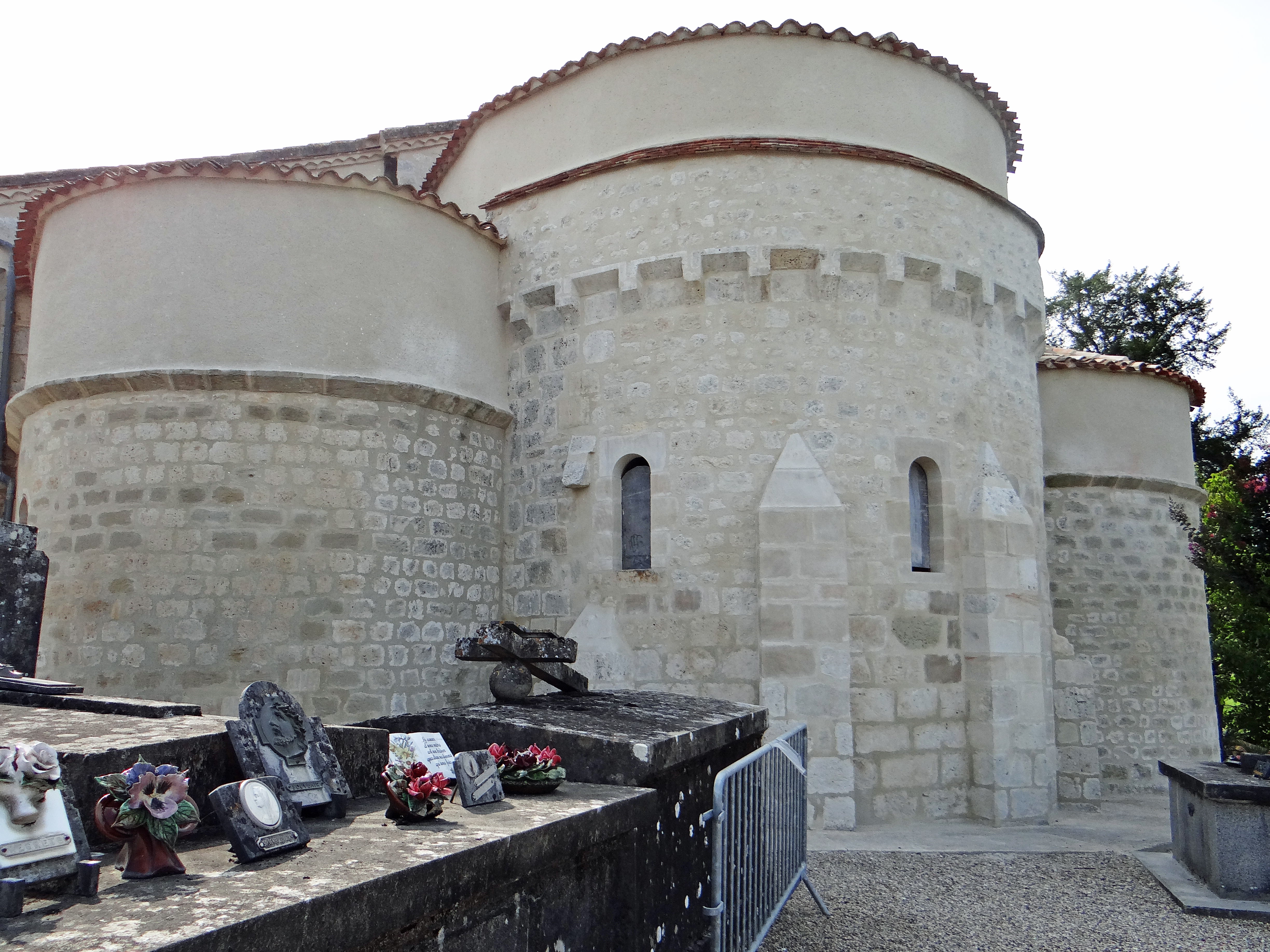 Saint-Colomb-de-Lauzun - Église Saint-Colomban - Chevet